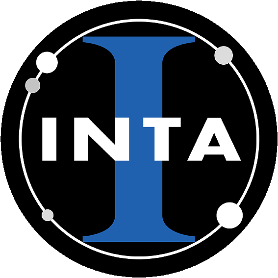 Logo del INTA